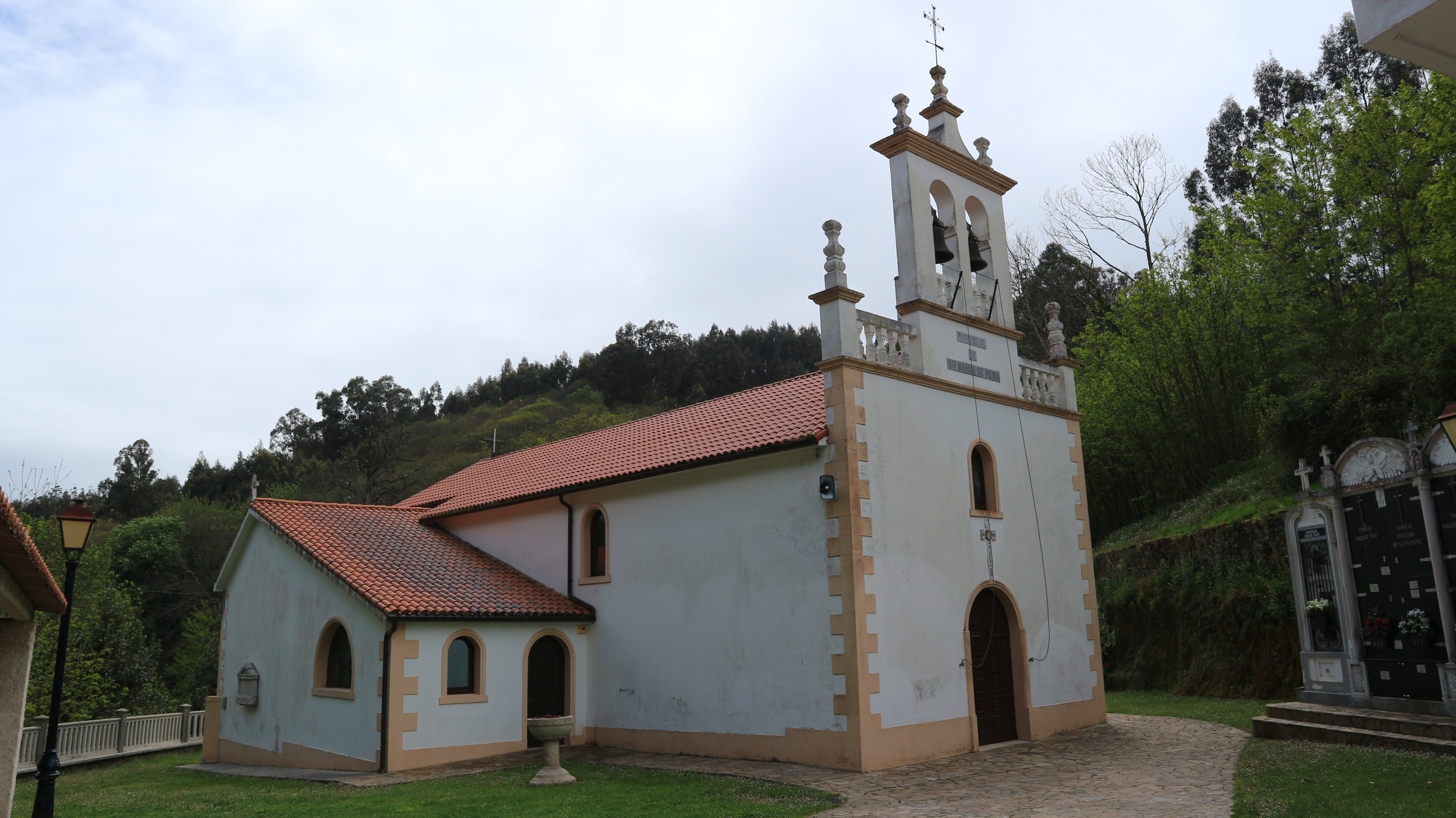 Igrexa de Santa Mariña de Beira. Beira, Carral.